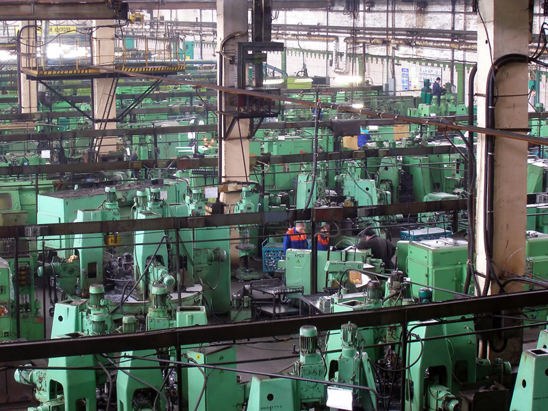 Второй механосборочный цех Полтавского автоагрегатного завода